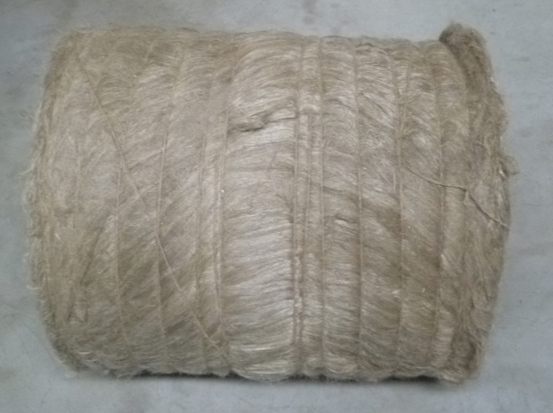 Vlasvezel na het zwingelen, verpakt in een baal.